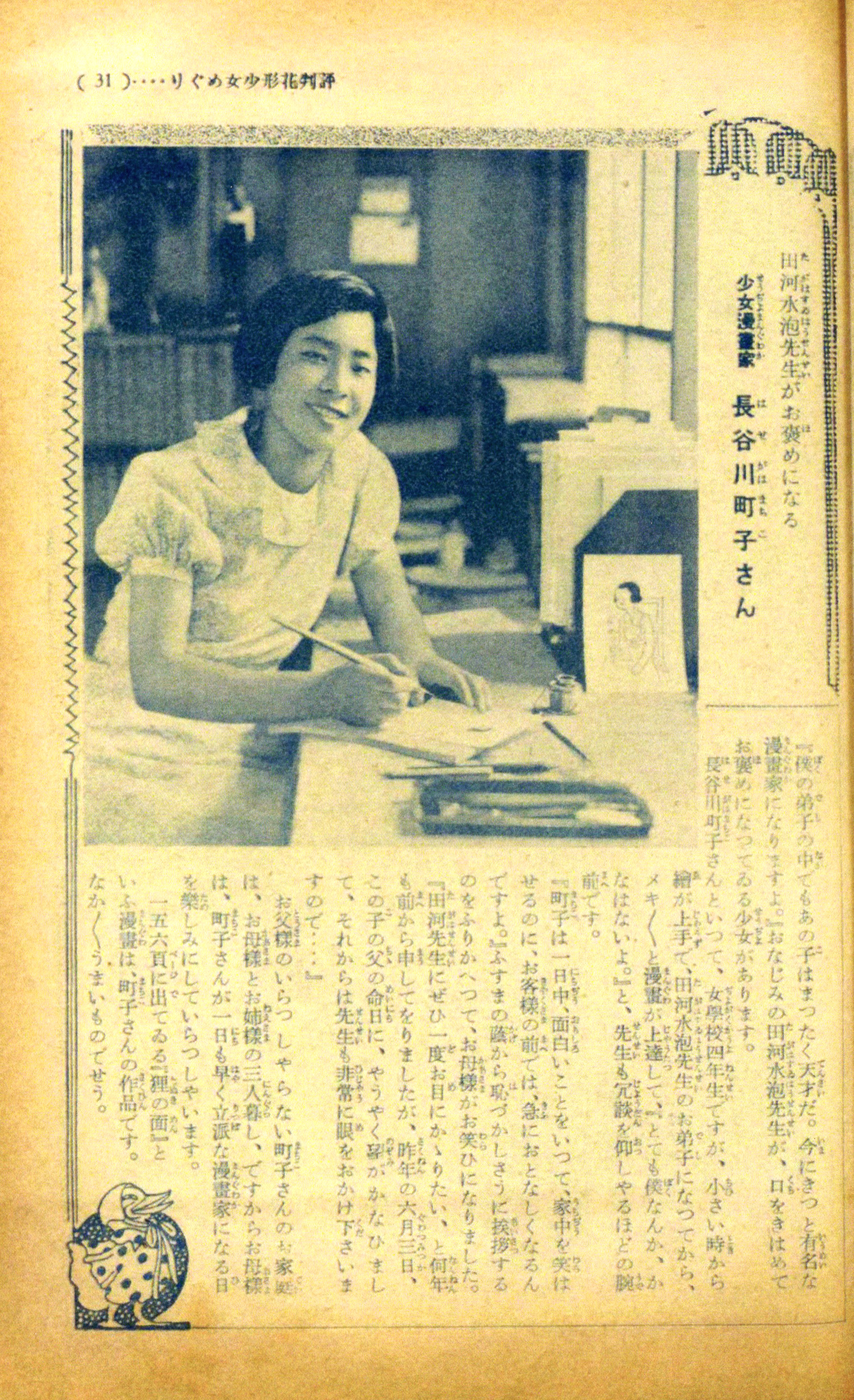 『少女倶楽部』1935年10月号に掲載された長谷川町子のグラビア写真。当時は山脇高等女学校に在学中であった。